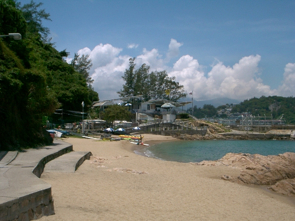 長洲